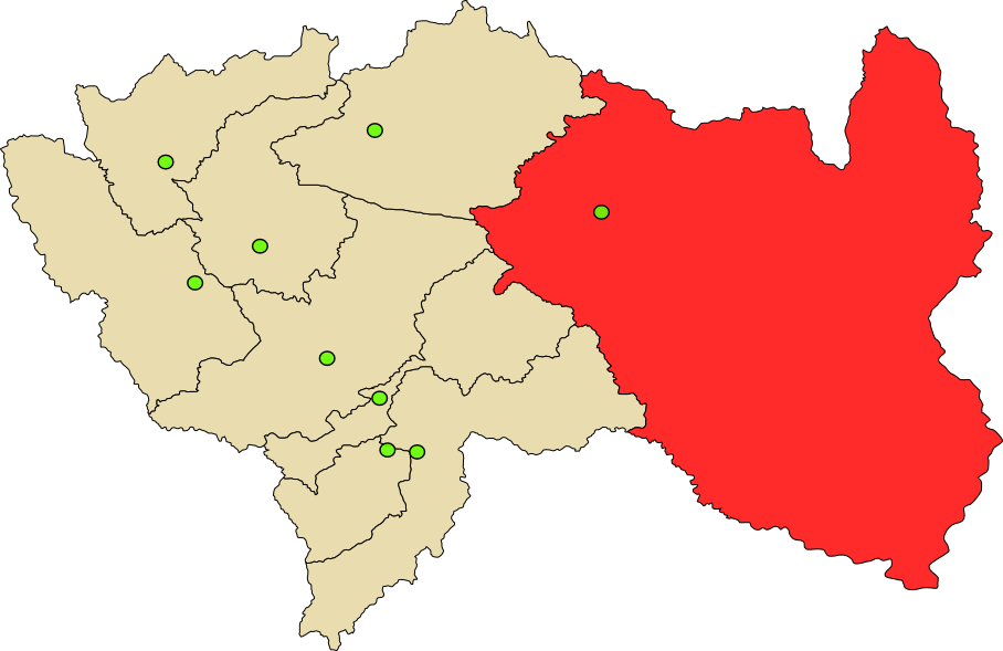 Mapa de Provincia de Satipo en Perú